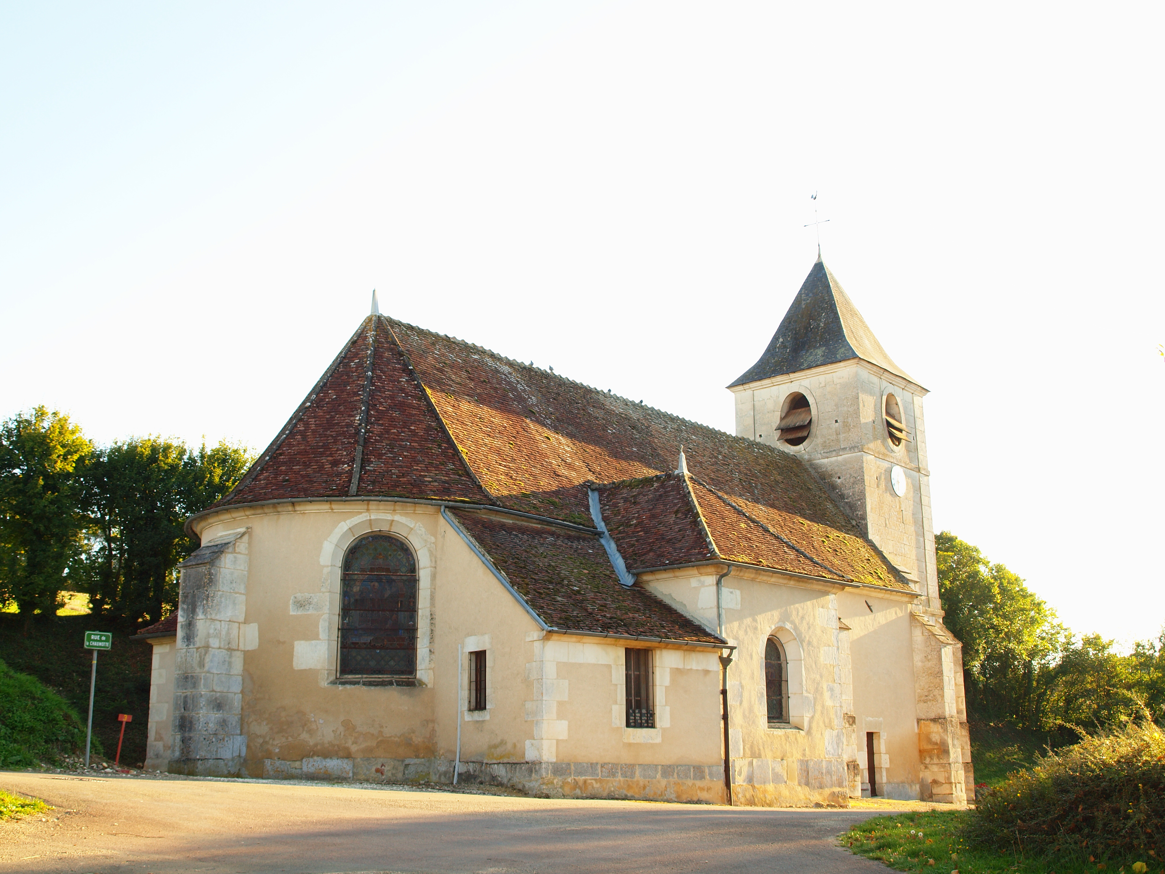 Église Saint-Charles de Coulangeron (Yonne, France)